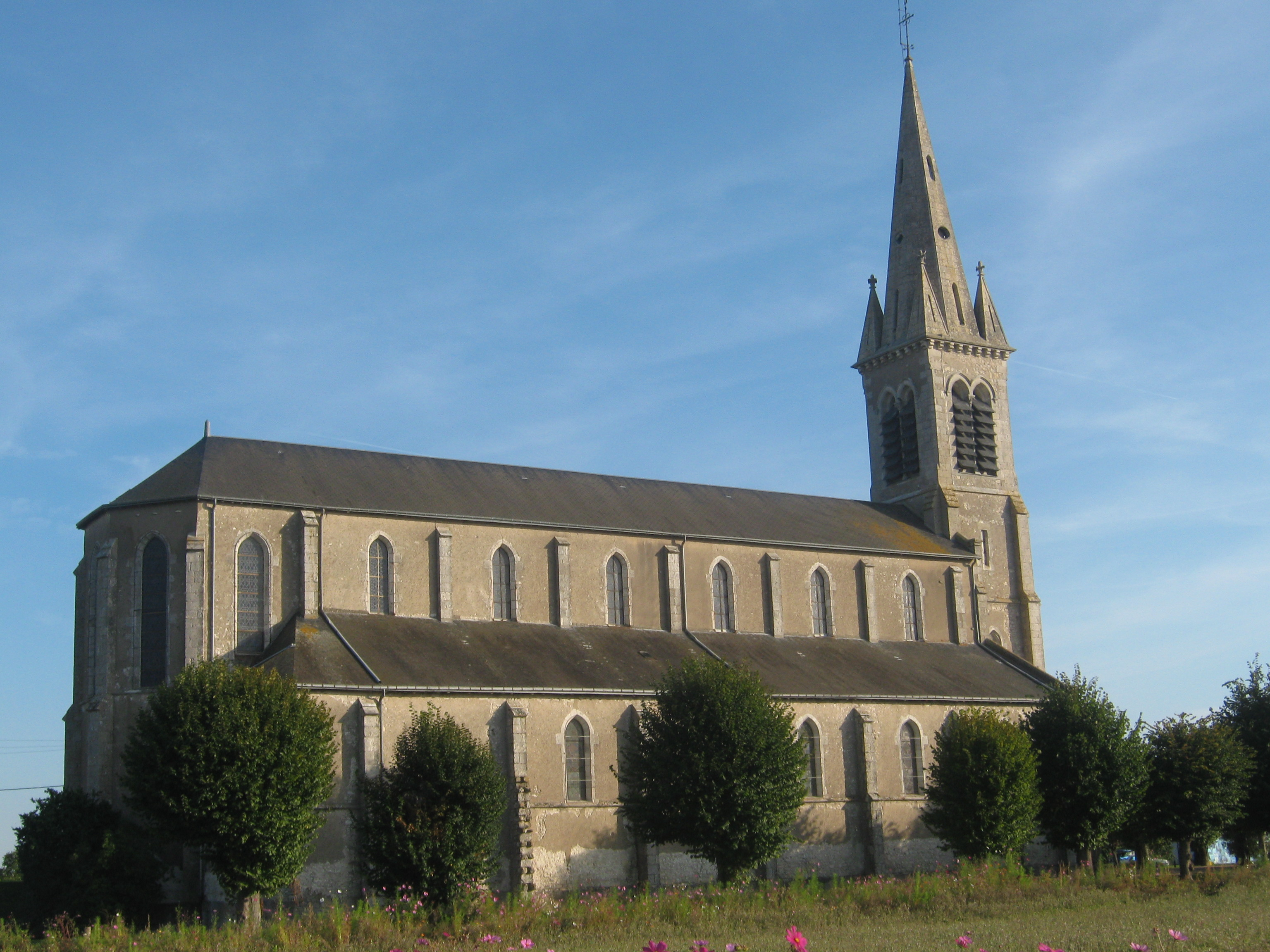 Vue de l'église de Baule.